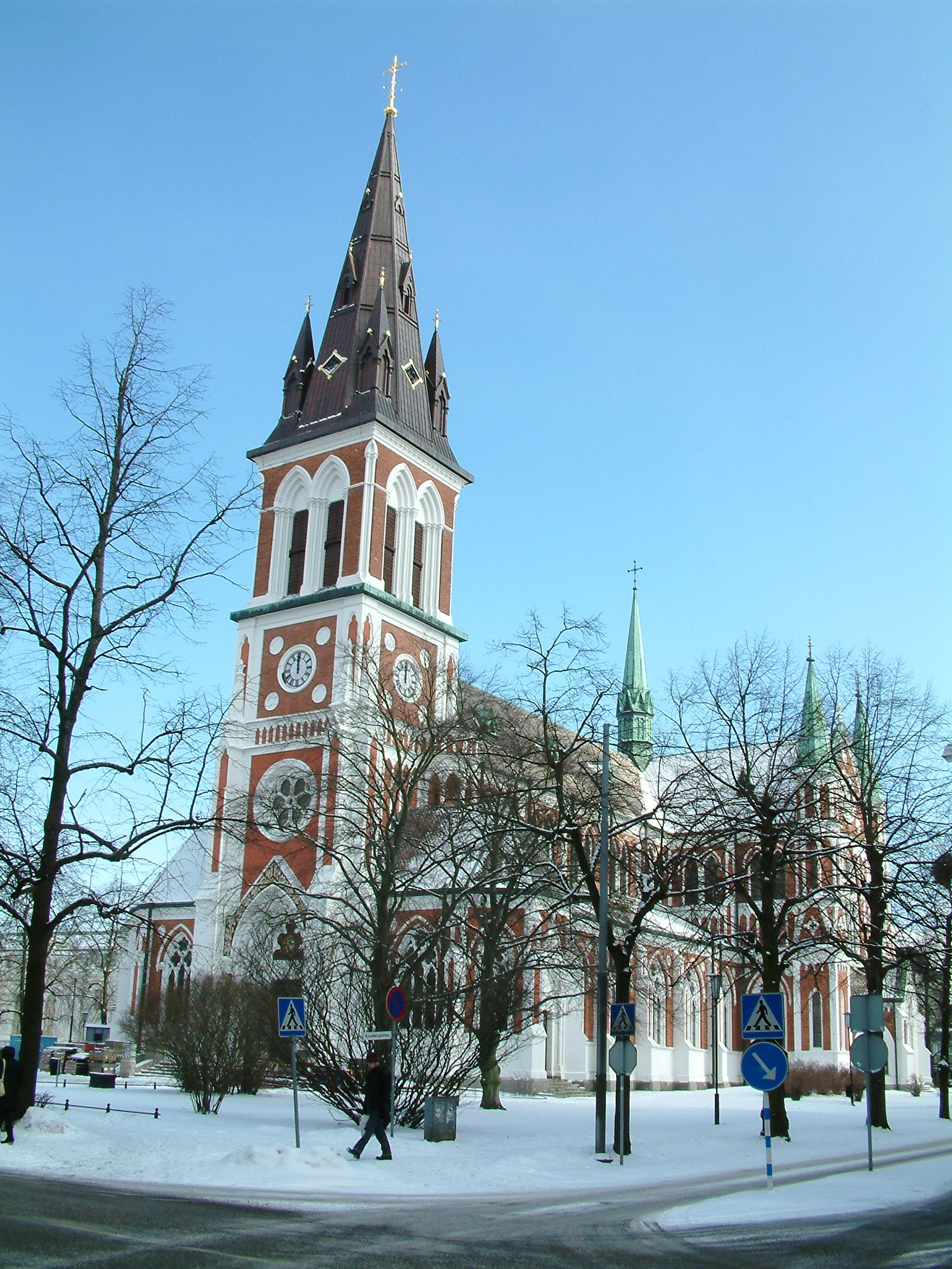 Sofia Jönköping's church (Sofiakyrkan), Jönköping